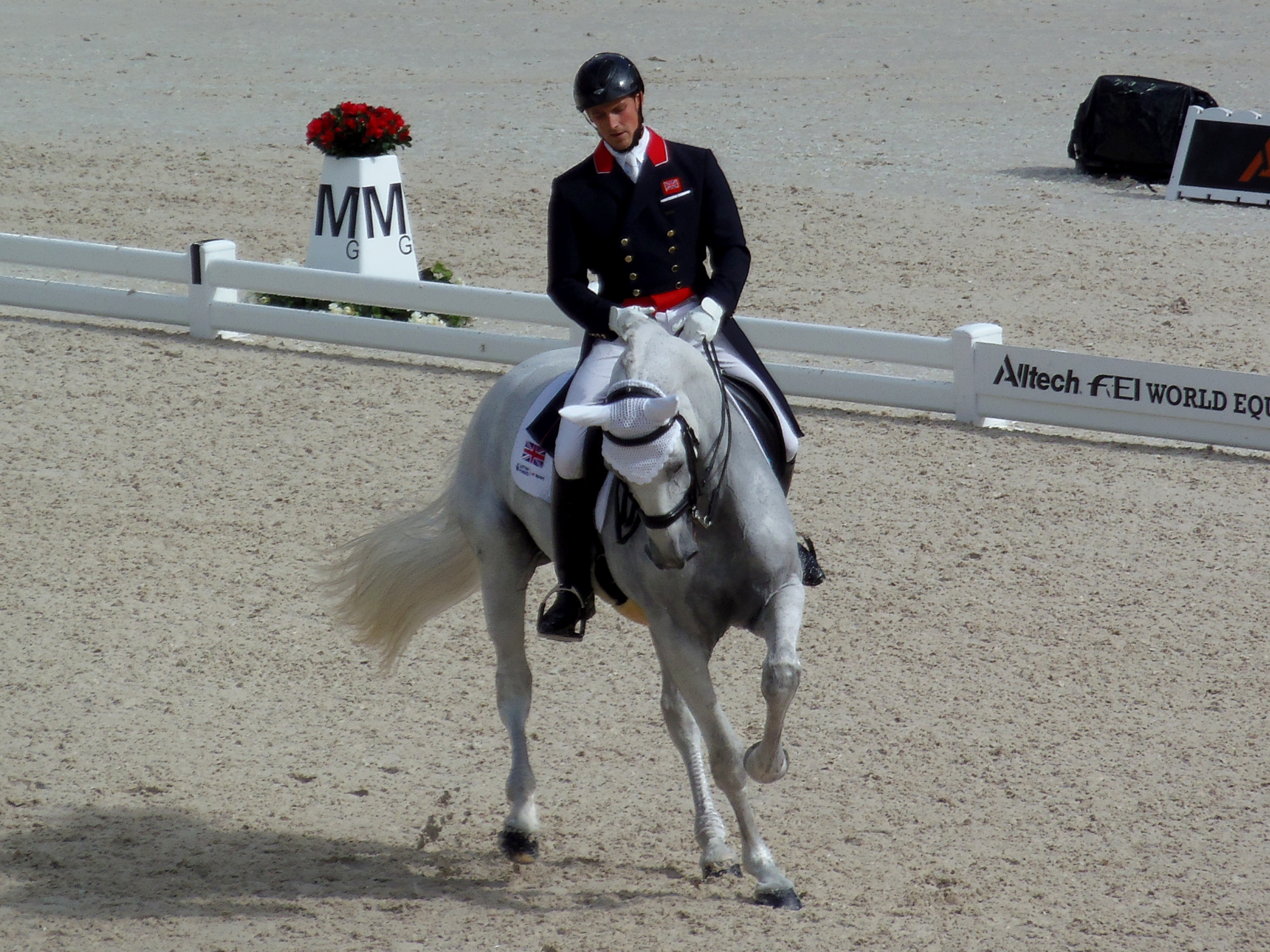 Michael Eilberg en selle sur Half Moon Delphi lors des Jeux équestres mondiaux, le 26 août 2014 au stade d'Ornano à Caen (Normandie, France).